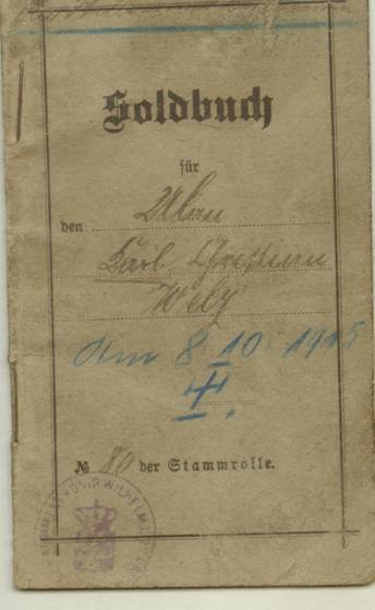 Titelseite eines Soldbuchs von 1914